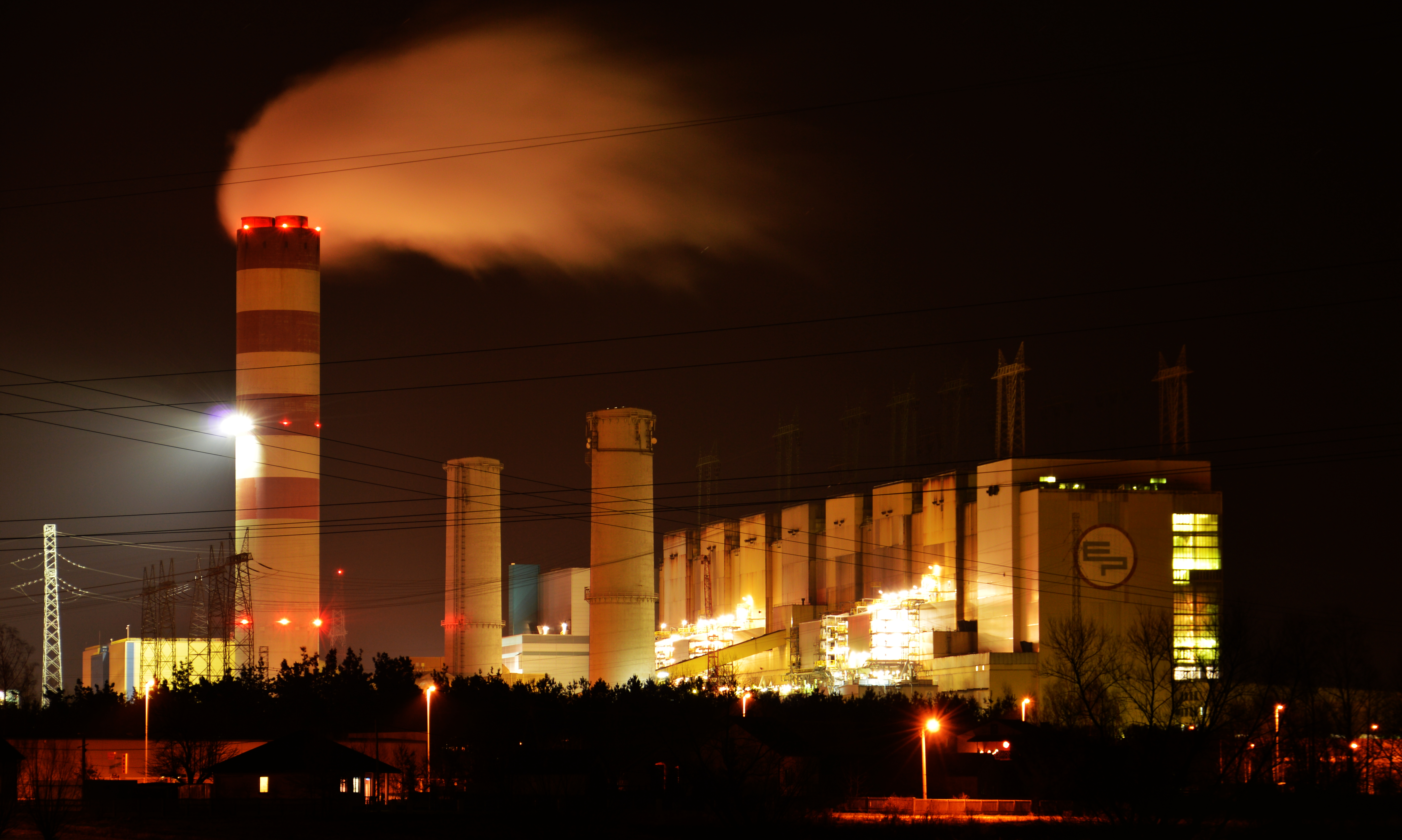 Elektrownia Połaniec 25.12.2014